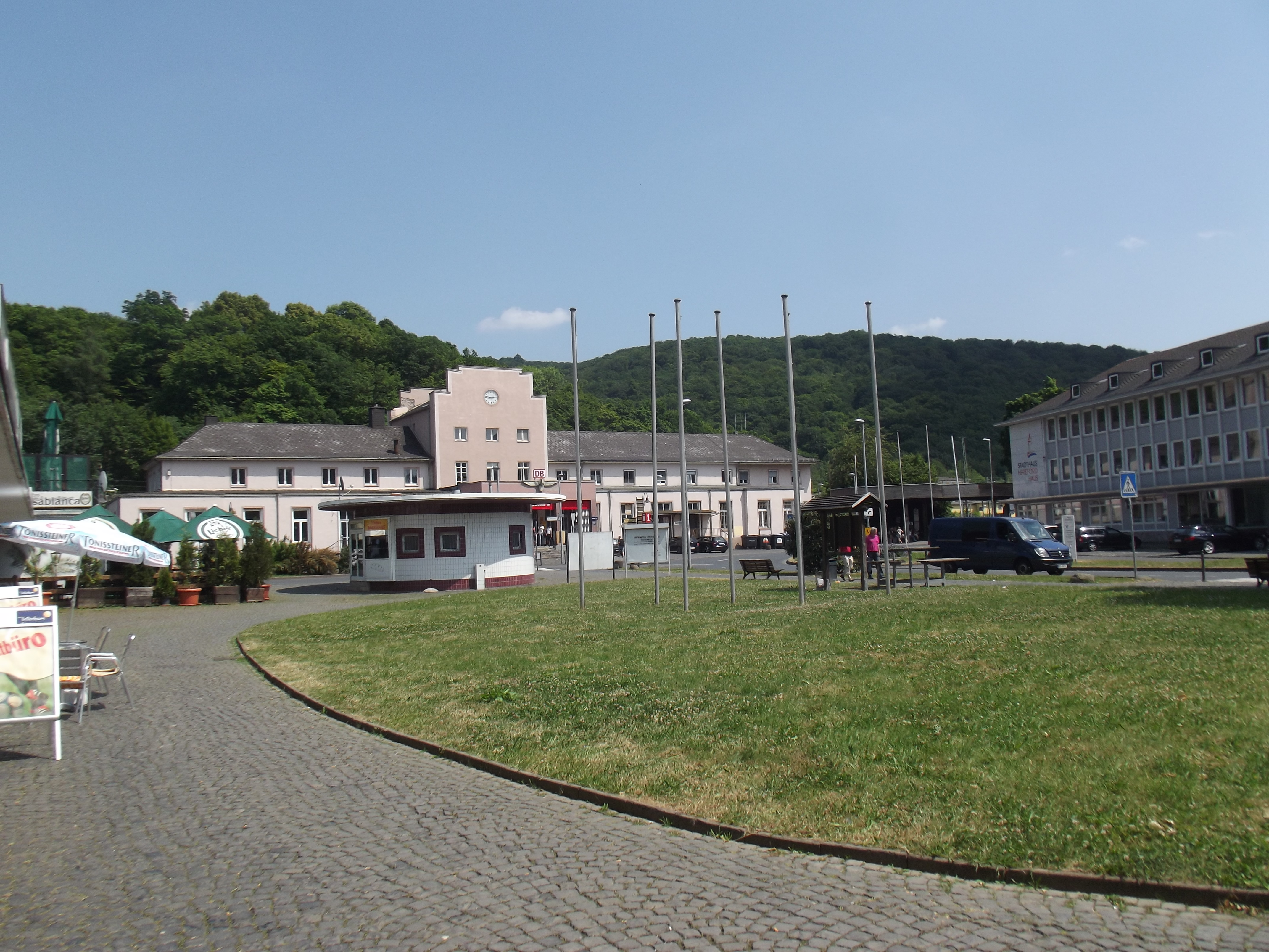 Het stationsgebouw van Dillenburg